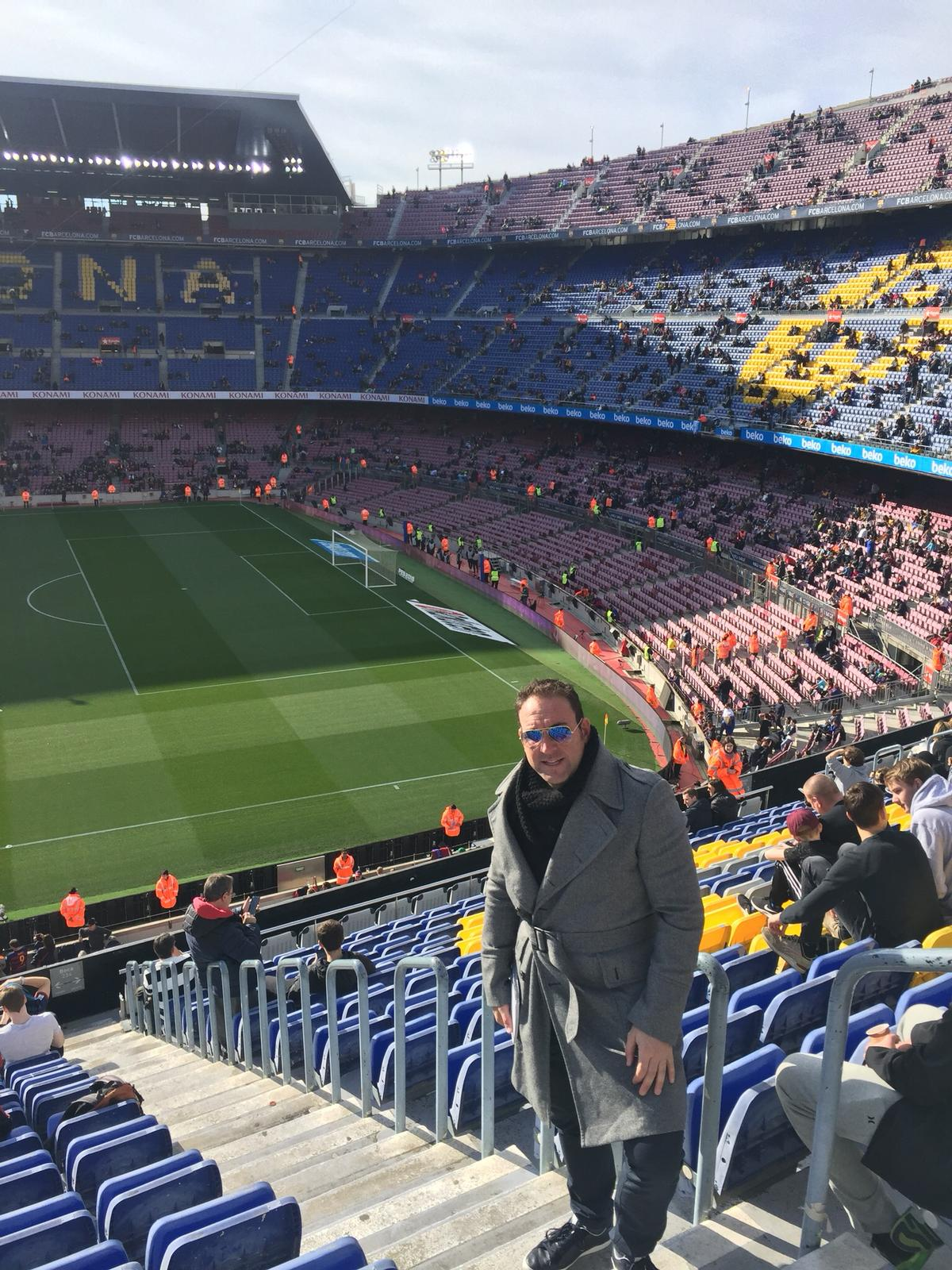 Foto actualizada 2018